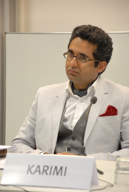 Ahmad Milad Karimi auf der Tagung "Herausforderungen an die Islamische Theologie in Europa", Universität Münster